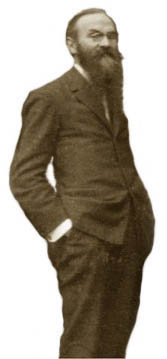 Extrait d'un portrait de groupe avec Pierre Bovet (1878-1965) et Jean Piaget (1896-1980), devant la porte de l’Institut Jean-Jacques Rousseau à Genève en 1925